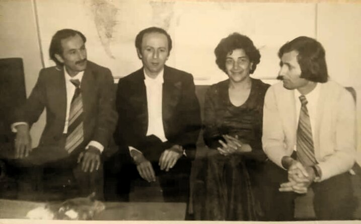 Слева направо: Даниел Еражишт, Жан Тер-Меркерян, пианистка Зилине Закарян, кларнетист Альберт Аракелян